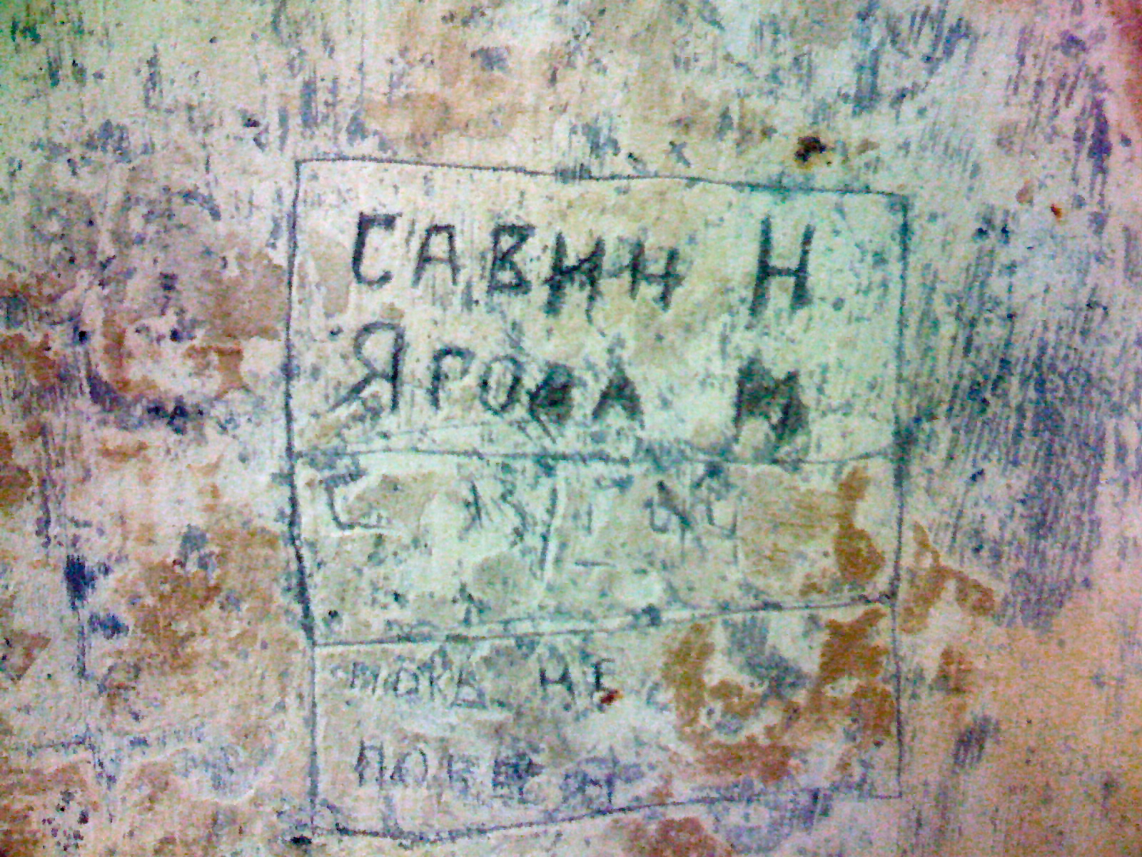 Detail einer Wandinschrift im ehemaligen Gestapo-Gefängnis Köln, heute Gedenkstätte „El-De-Haus“, NS-Dokumentationszentrum der Stadt Köln